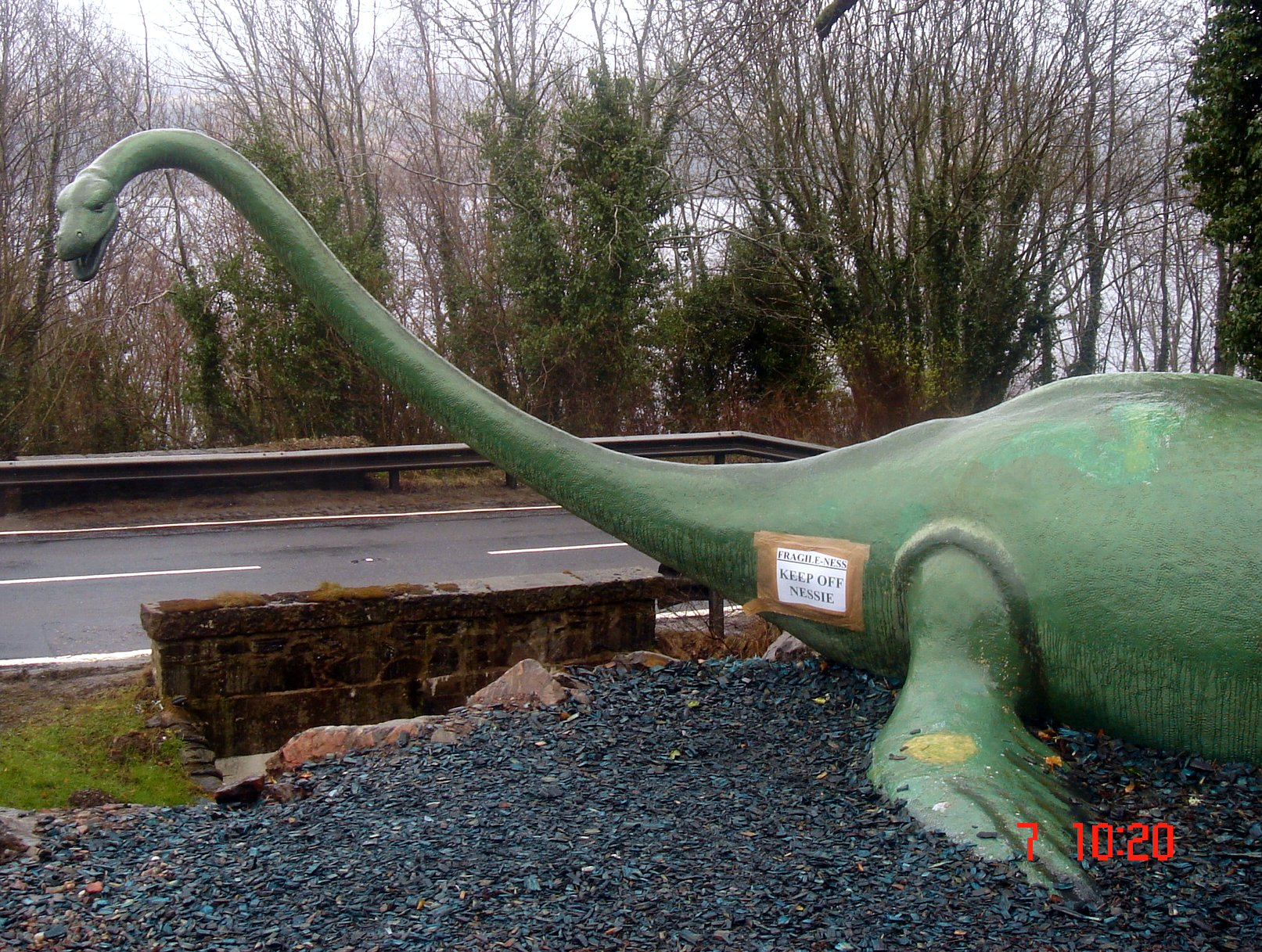 Nessie